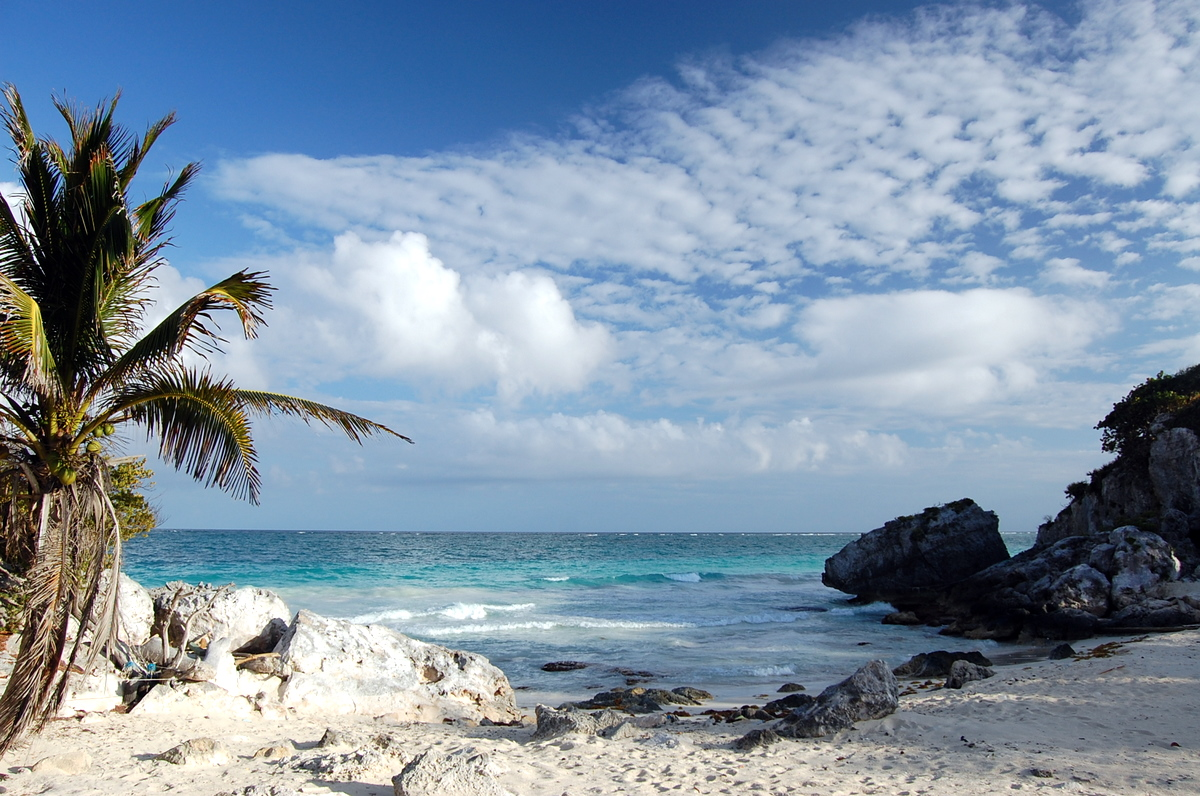 Caribbean near Tulum